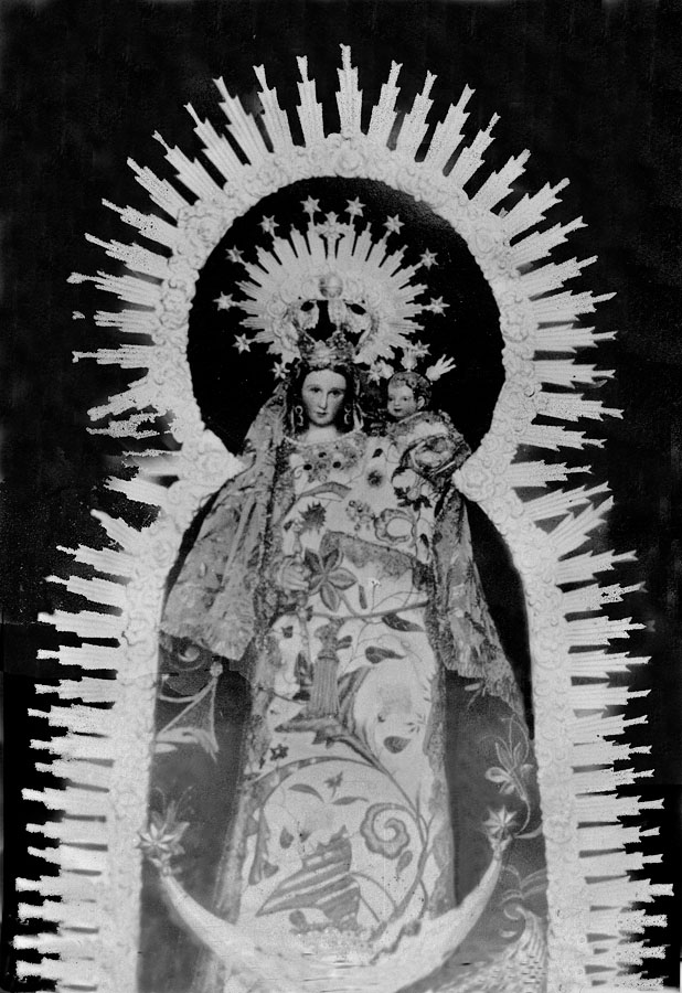 Nª Sª de los Milagros, vestida. Fotografía realizada antes de la guerra civil española.